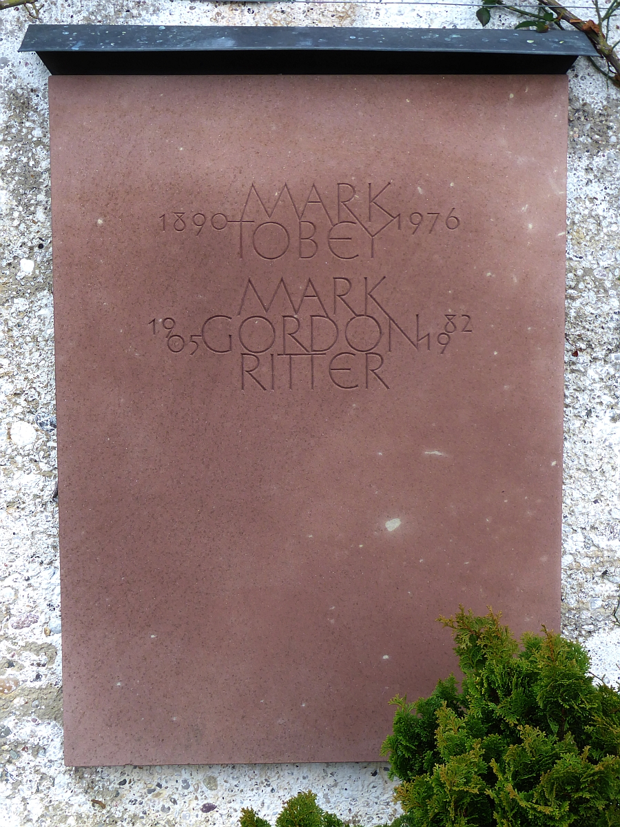 Mark Tobey (1890–1976), Künstler, Maler, Grab auf dem Friedhof Hörnli, Riehen, Basel-Stadt